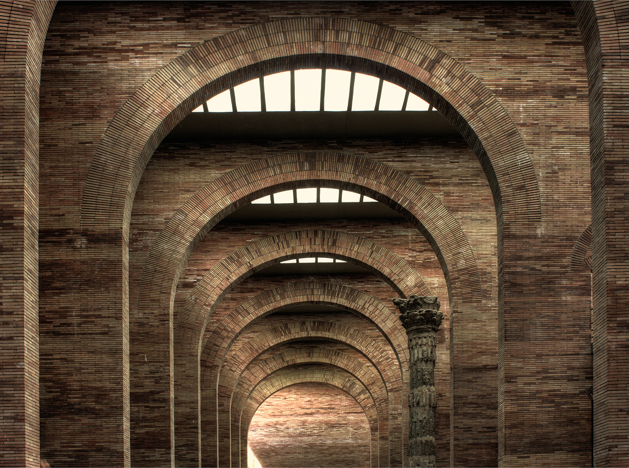 Museo Nacional de Arte Romano de Mérida. Badajoz // National Roman Art Museum of Mérida. Spain. 2008